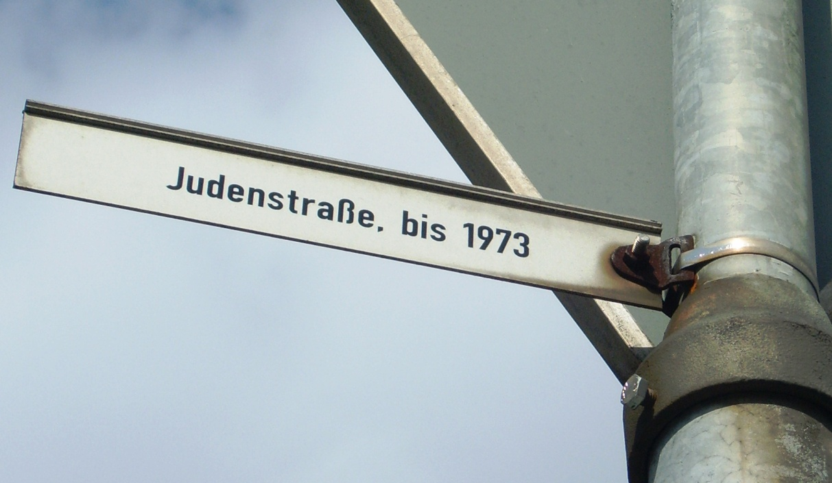 Zusatzschild in Erinnerung an die ehemalige Judenstraße in der Eschweiler Altstadt